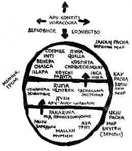 Косомлогия инков. Три мира